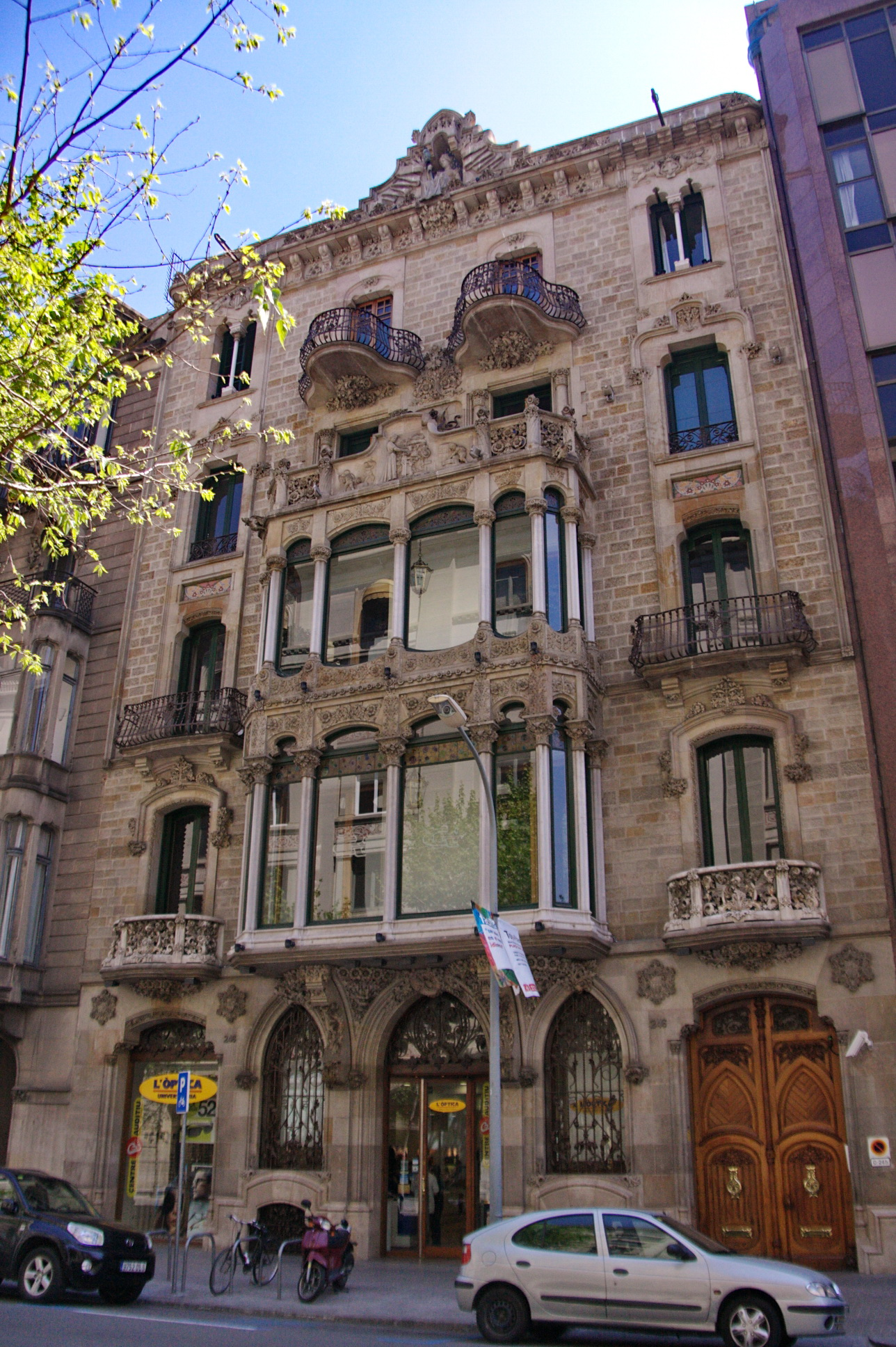 Casa Berenguer de Joan Bassegoda (Barcelona)